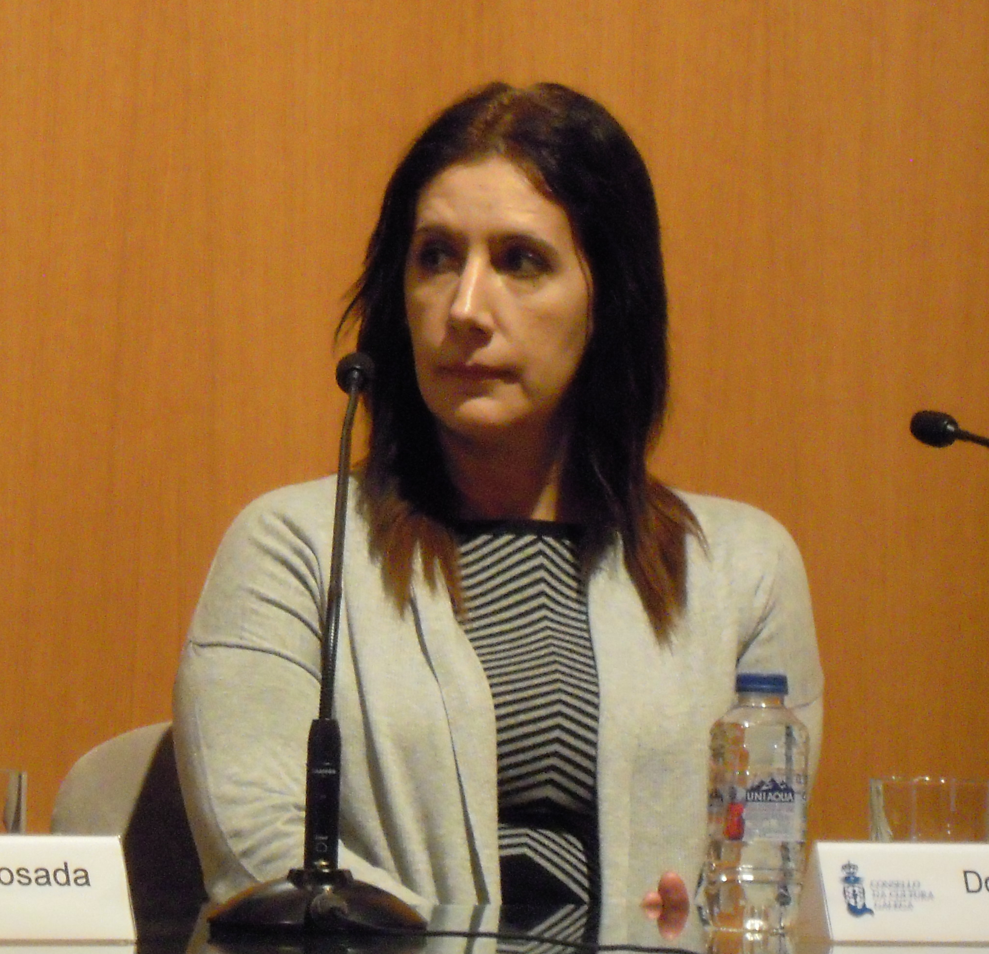 A escritora Dolores Redondo na xornada 30 anos de novela negra galega, organizada polo Consello da Cultura Galega